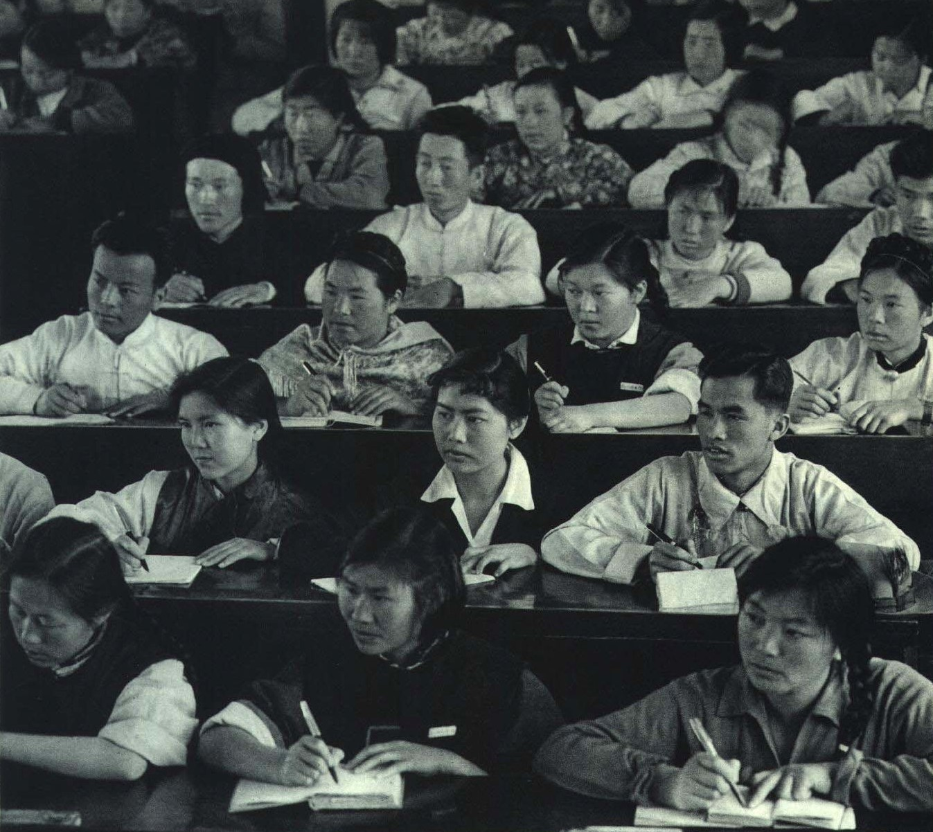 1963-07 1963年 昆明医学院